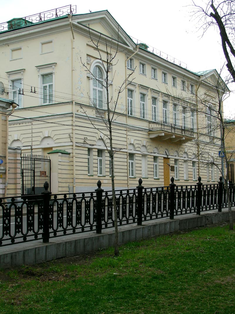 Petrovsky Boulevard, Moscow.